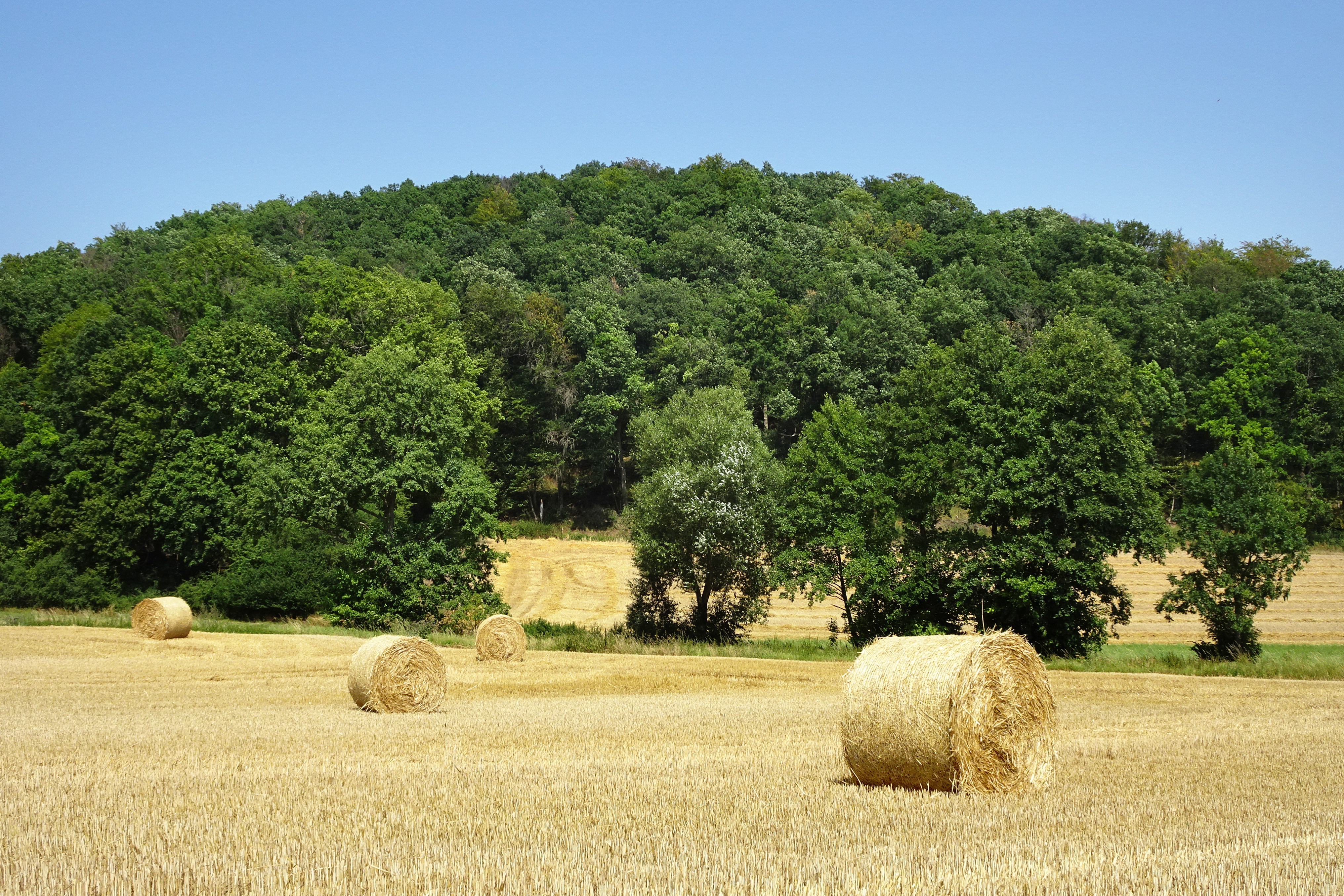 Der „Wald südöstlich von Netra“ liegt im nördlichen Hessen, in der Nähe der Landesgrenze zu Thüringen. Administrativ gehören die Flächen zu den Gemarkungen der Ortsteile Netra, Rittmannshausen und Lüderbach der Gemeinde Ringgau im nordhessischen Werra-Meißner-Kreis. Der sich in einer Talung des Muschelkalk-Plateaus des Ringgaus befindende Bereich wird durch ein Mosaik verschiedener Waldgesellschaften und von Kalk-Halbtrockenrasen geprägt. Wegen dem Vorkommen von Lebensräumen sowie Tier- und Pflanzenarten, die nach der im Jahr 1992 von den Mitgliedstaaten der Europäischen Union beschlossenen Flora-Fauna-Habitat-Richtlinie als von gemeinschaftlicher Bedeutung gelten, wurde der Bereich zu einem Bestandteil des europaweiten Schutzgebietssystems Natura 2000.